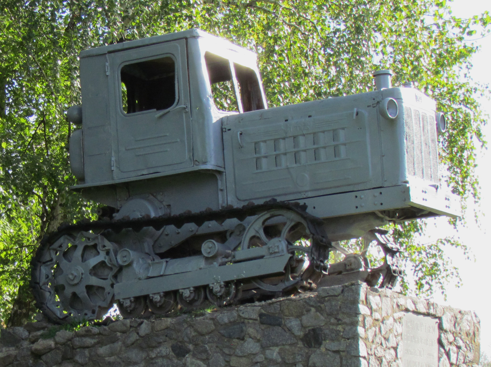 Шишацький район. Пам’ятник трудової Слави – трактор «Т-38» на честь 50-річчя від дня заснування Шишацької МТС